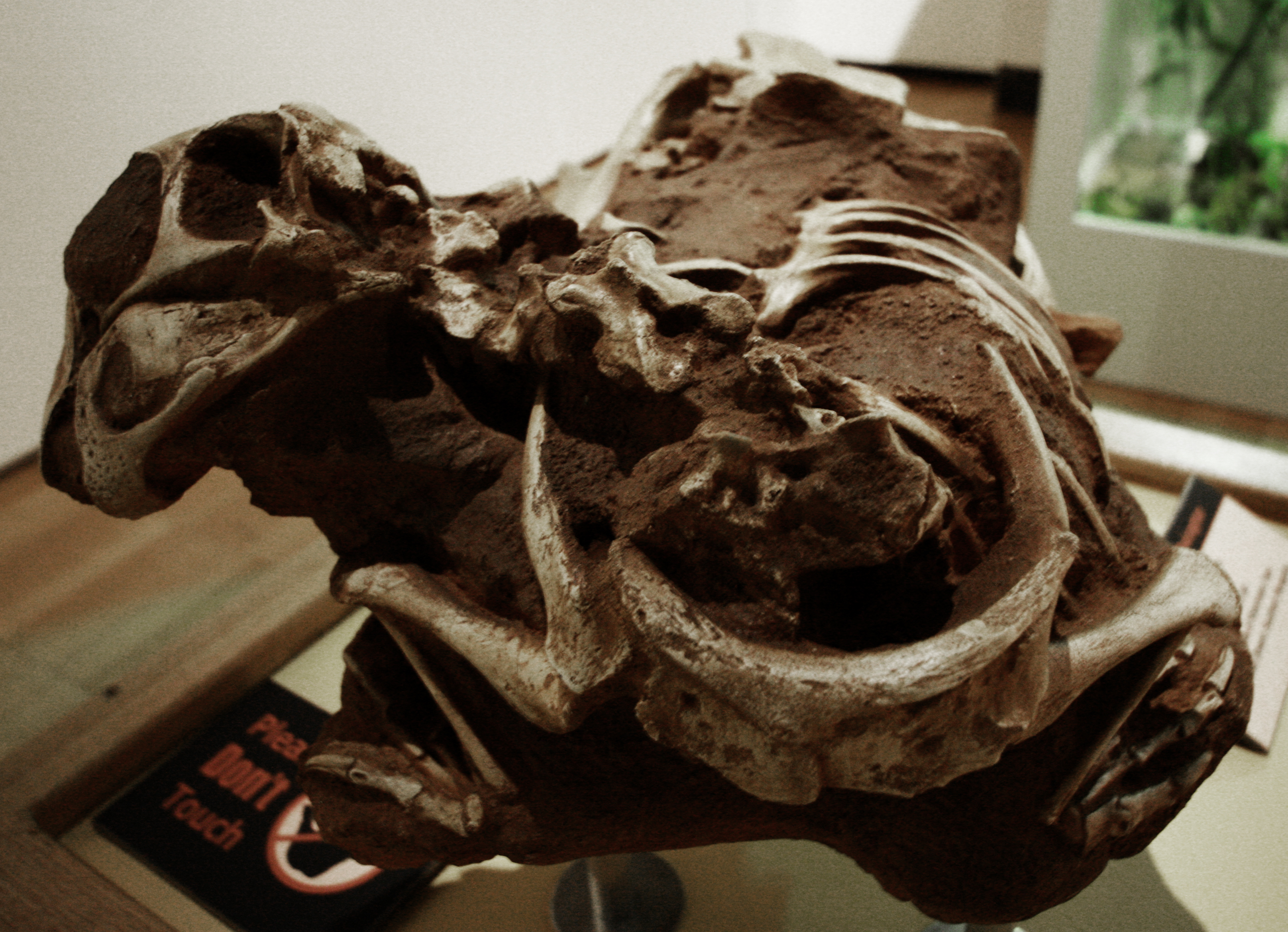 PREHISTORIC AGE 10